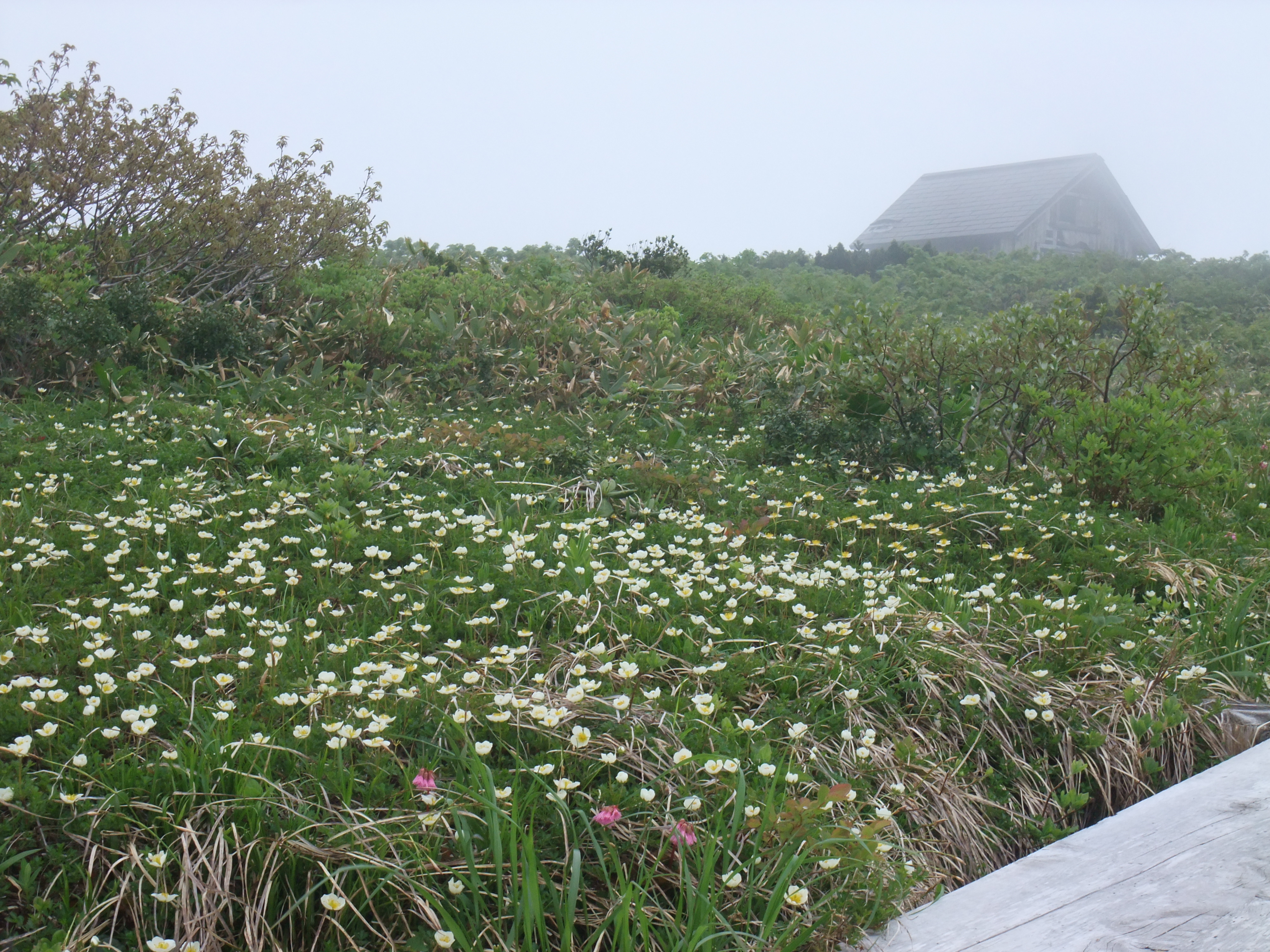 虎毛山山頂の高山植物